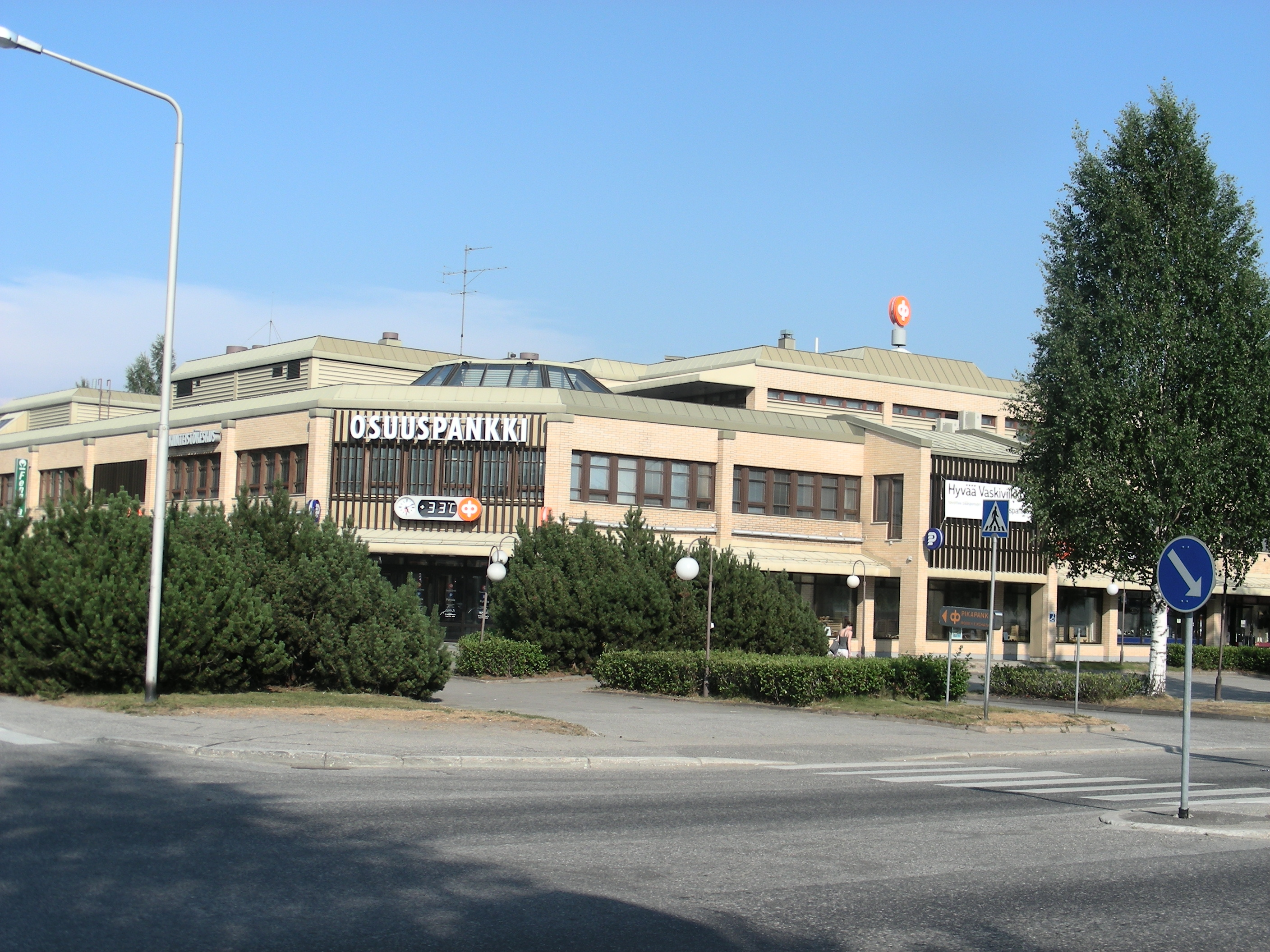 Lieksan kulttuurikeskus cultural centre and concert hall